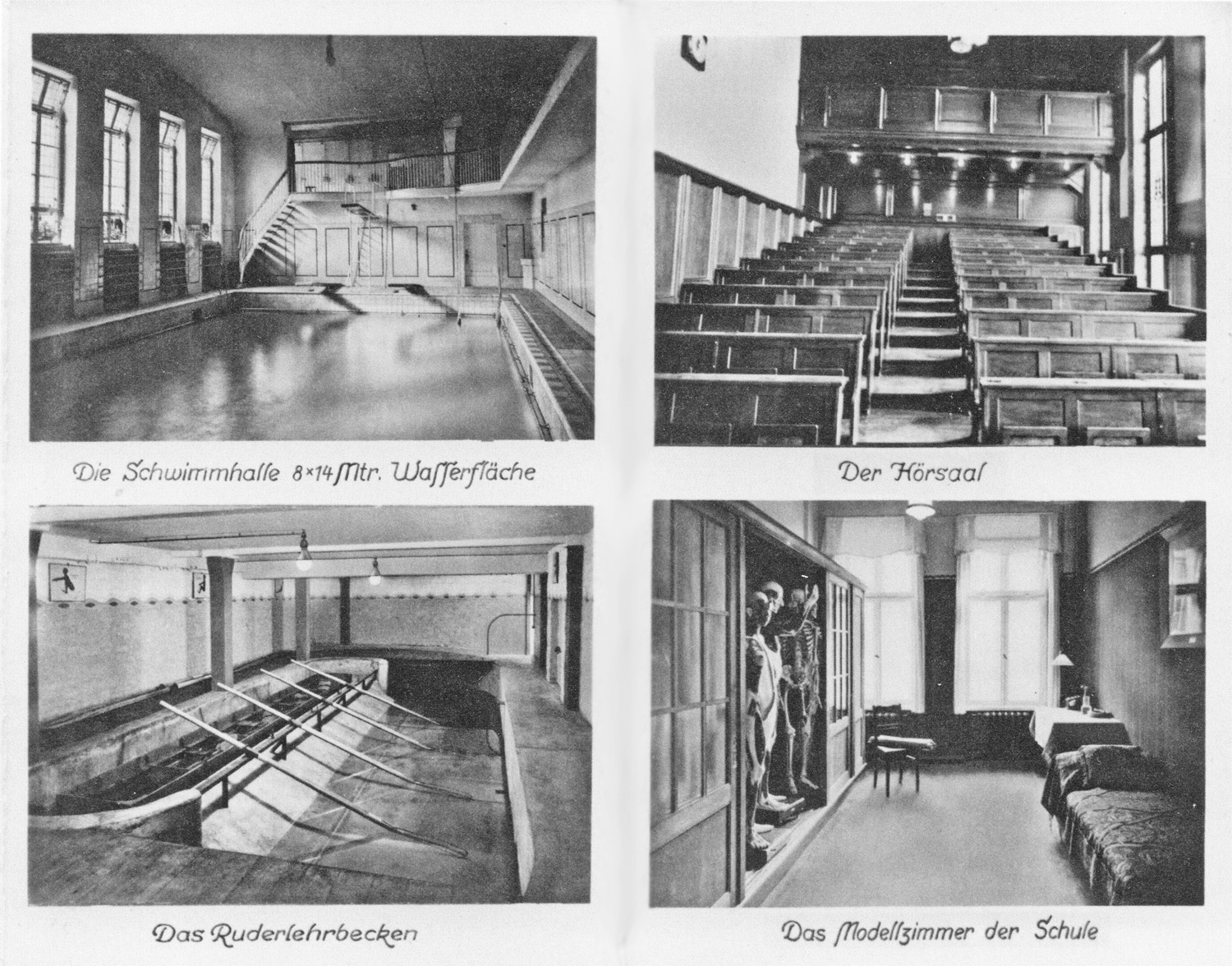 Einrichtungen in der Arbeiter-Turn- und Sportschule Leipzig, Fichtestraße (1926-1933)